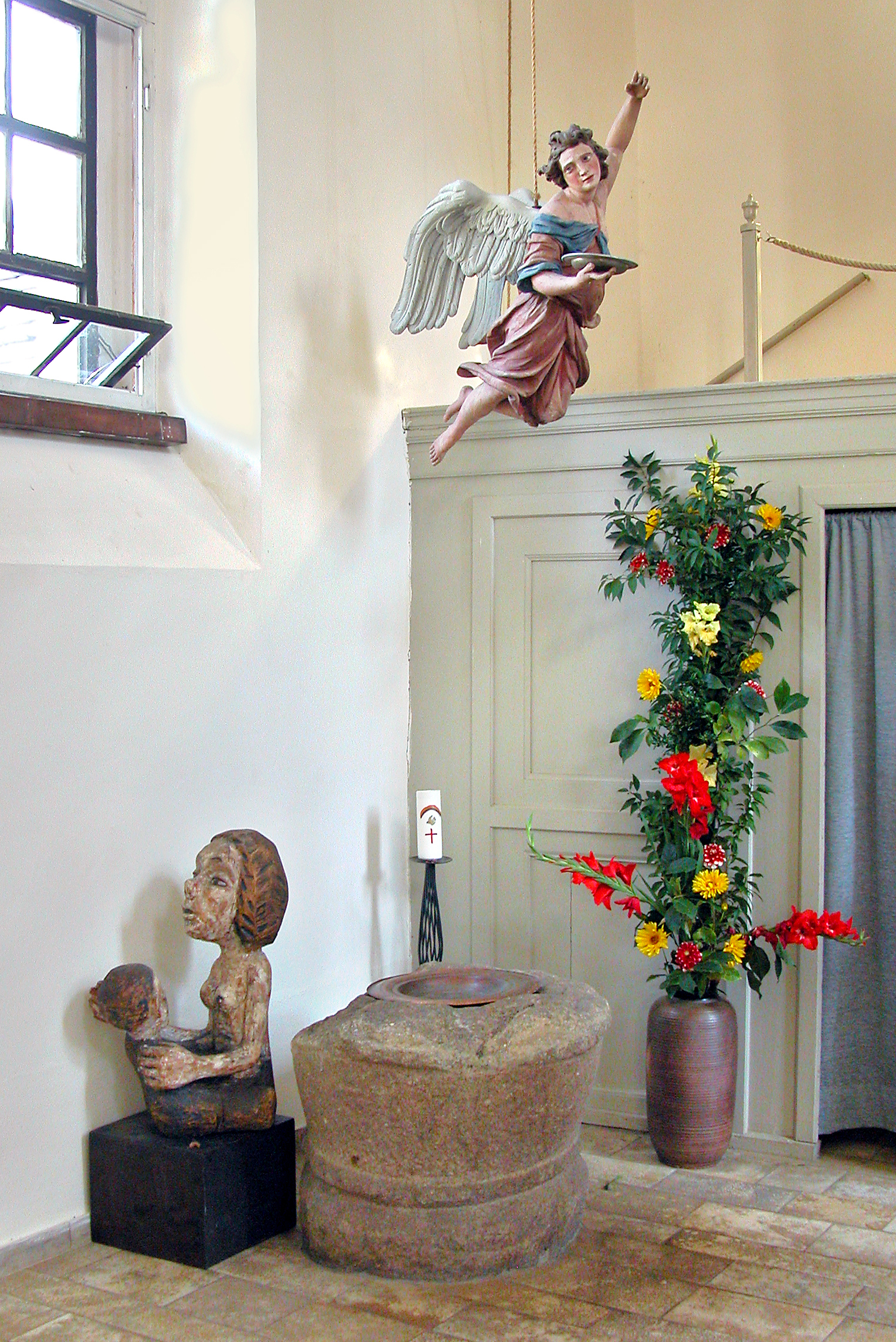 18.08.2009 04451 Panitzsch (Borsdorf), Kirchweg (GMP: 51.365350,12.535083): Dorfkirche auf älter (romanischer) Grundlage. 1705 barockisiert. Romanischer Taufstein, barocker Taufengel und neuzeitliche Mutter-Kind Skulptur. [DSCN38515.TIF]200908180080DR.JPG(c)Blobelt